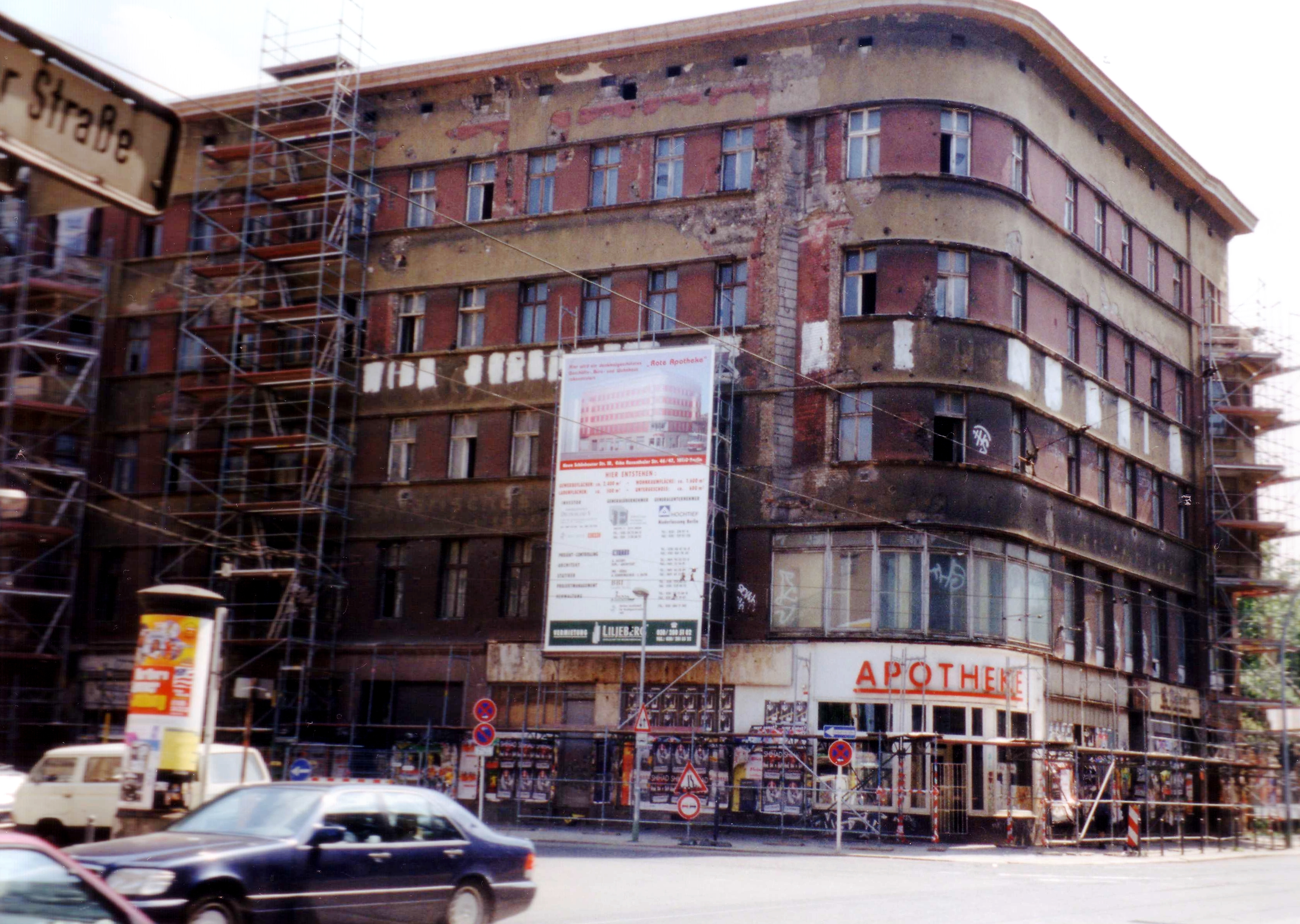 Das Haus mit den Anschriften: "Neue Schönhauser Straße 10" und "Rosenthaler Straße 46/47. Renovierung der "Roten Apotheke" in Berlin-Mitte im Mai 1995. Das Gebäude von 1887 steht unter Denkmalschutz. Eine Apotheke gibt es dort nicht mehr (2009).